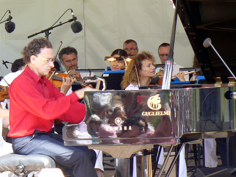 François-René Duchâble joue aux "Folies du lac", La Colmiane, Alpes-Maritimes, France